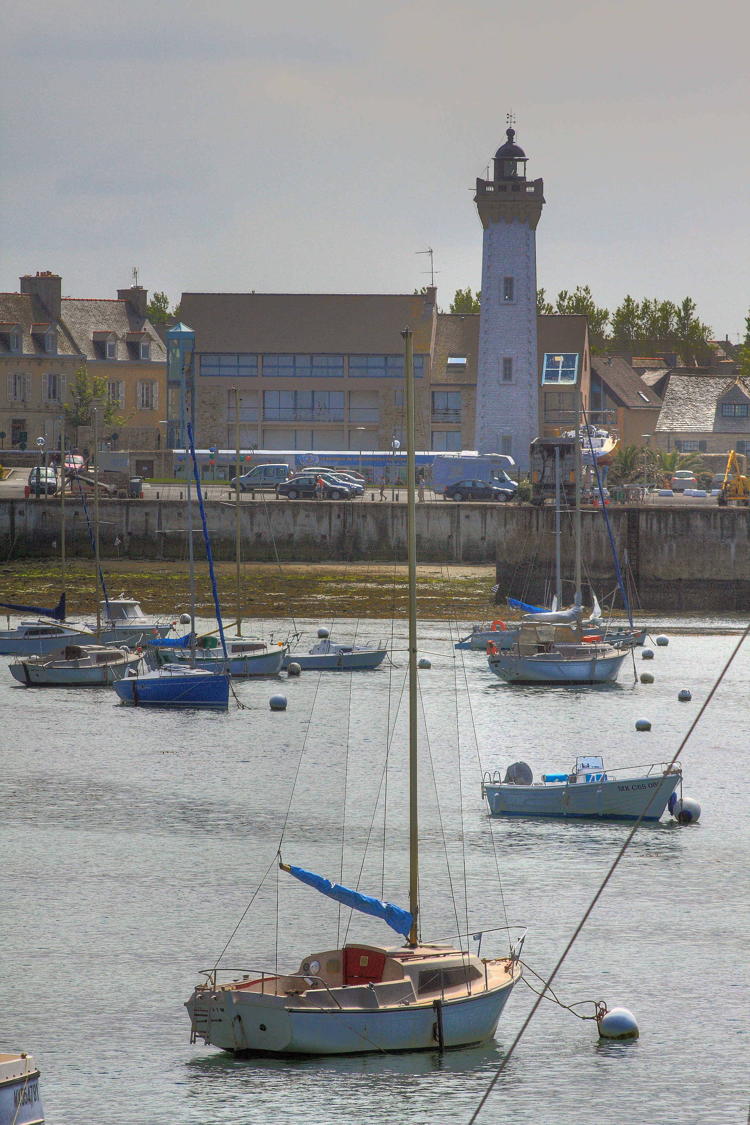 Le phare de Roscoff